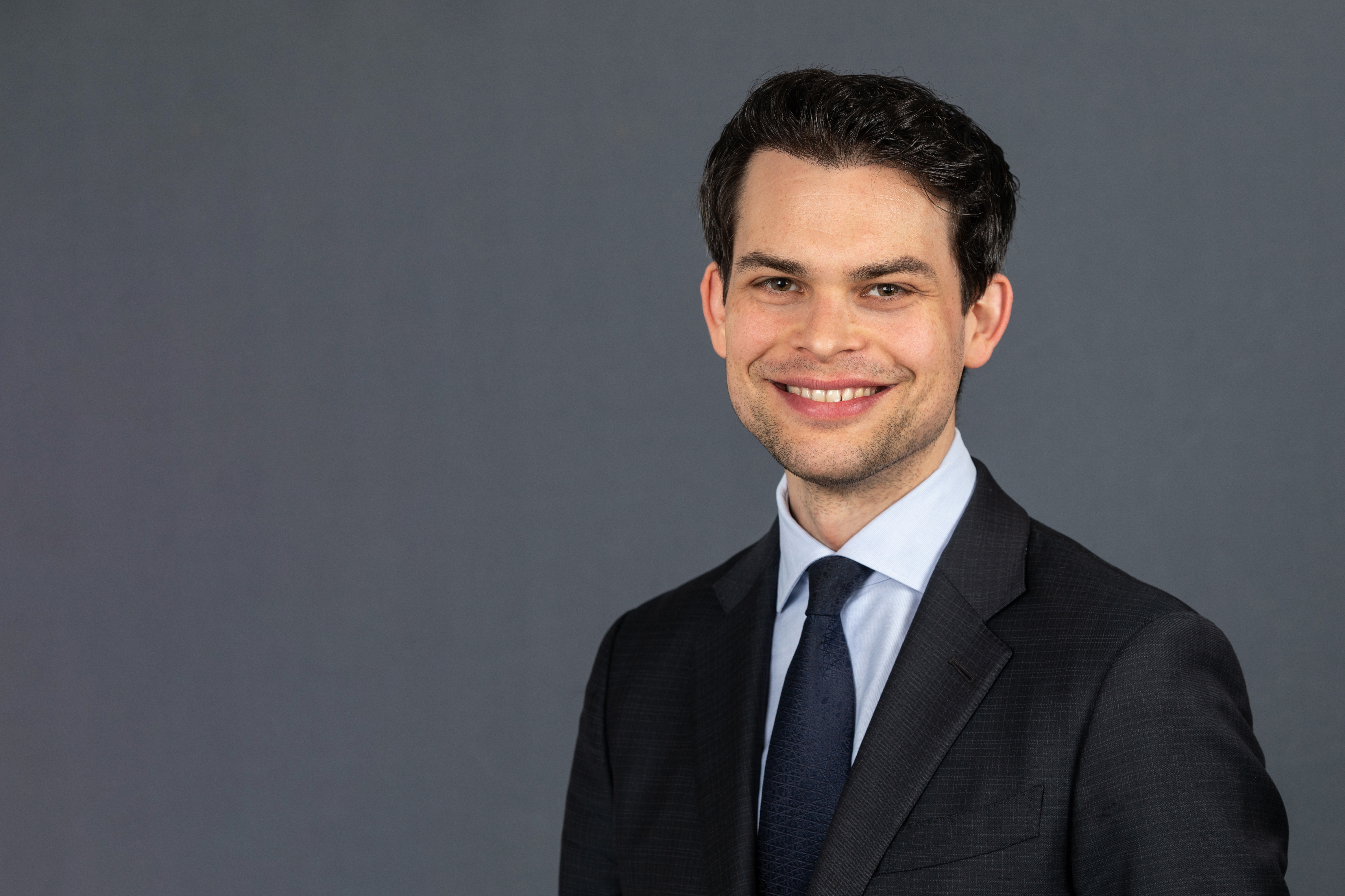 Christoph Ploß (CDU)